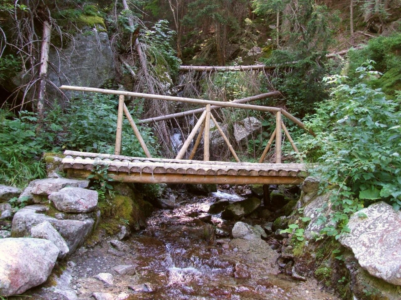 Raczkowy Potok (Tatry Zachodnie)